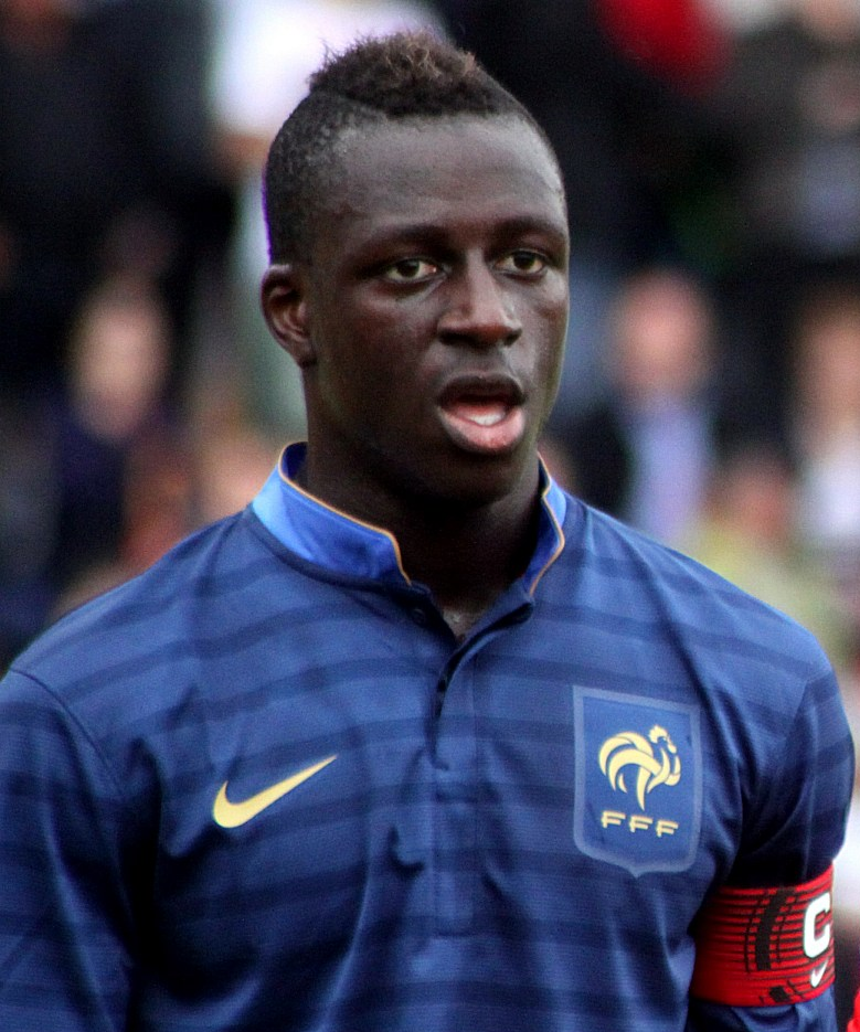 Qualifikationsspiel zur U-19 Fußball-Europameisterschaft: Österreich] gegen Frankreich am 10. Juni 2013 (0:1)] in Traiskirchen.] - Das Foto zeigt Benjamin Mendy (AC Le Havre, links) und Marcel Sabitzer (SK Rapid Wien). en Qualification for the 2013 UEFA European Under-19 Football Championship qualification Austria vs. France (0:1) on 2013-2013-06-10 in Traiskirchen. – The photo shows Benjamin Mendy (AC Le Havre, left) Marcel Sabitzer (SK Rapid Wien).